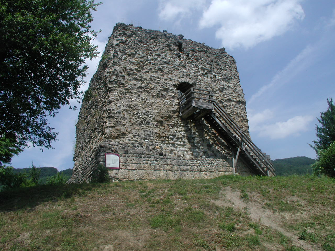 Burgruine Freienstein ist eine Burgruine in der Gemeinde Freienstein-Teufen im Schweizer Kanton Zürich.